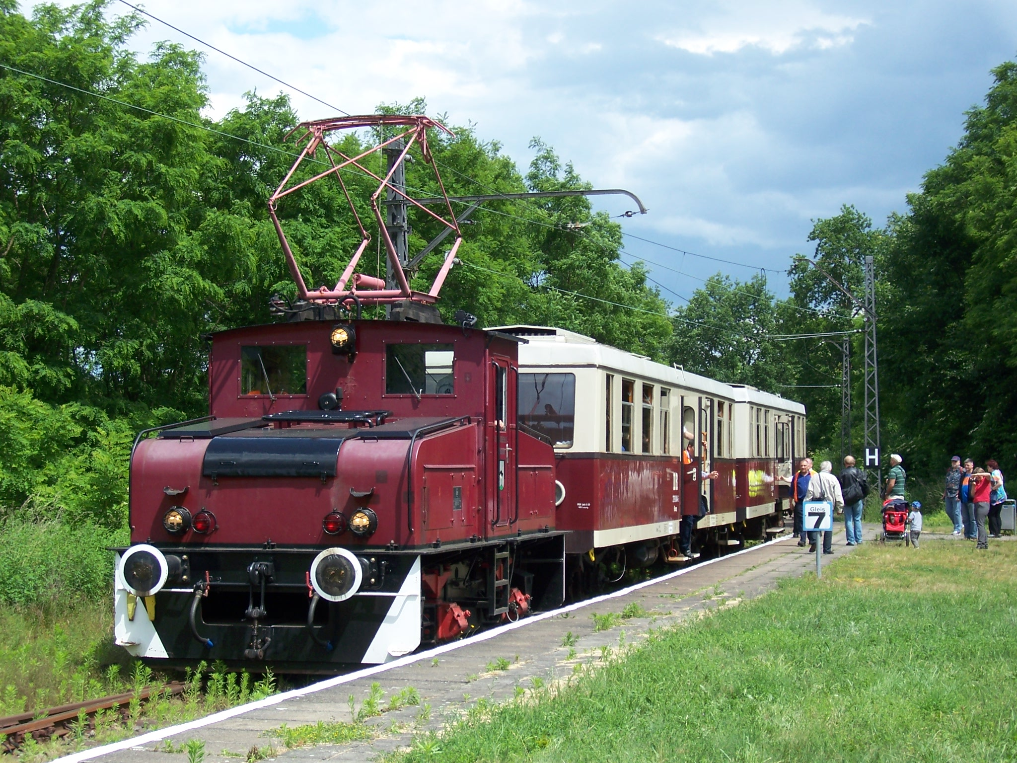 Bahnhof Müncheberg (Mark), Bahnsteig Buckower Kleinbahn